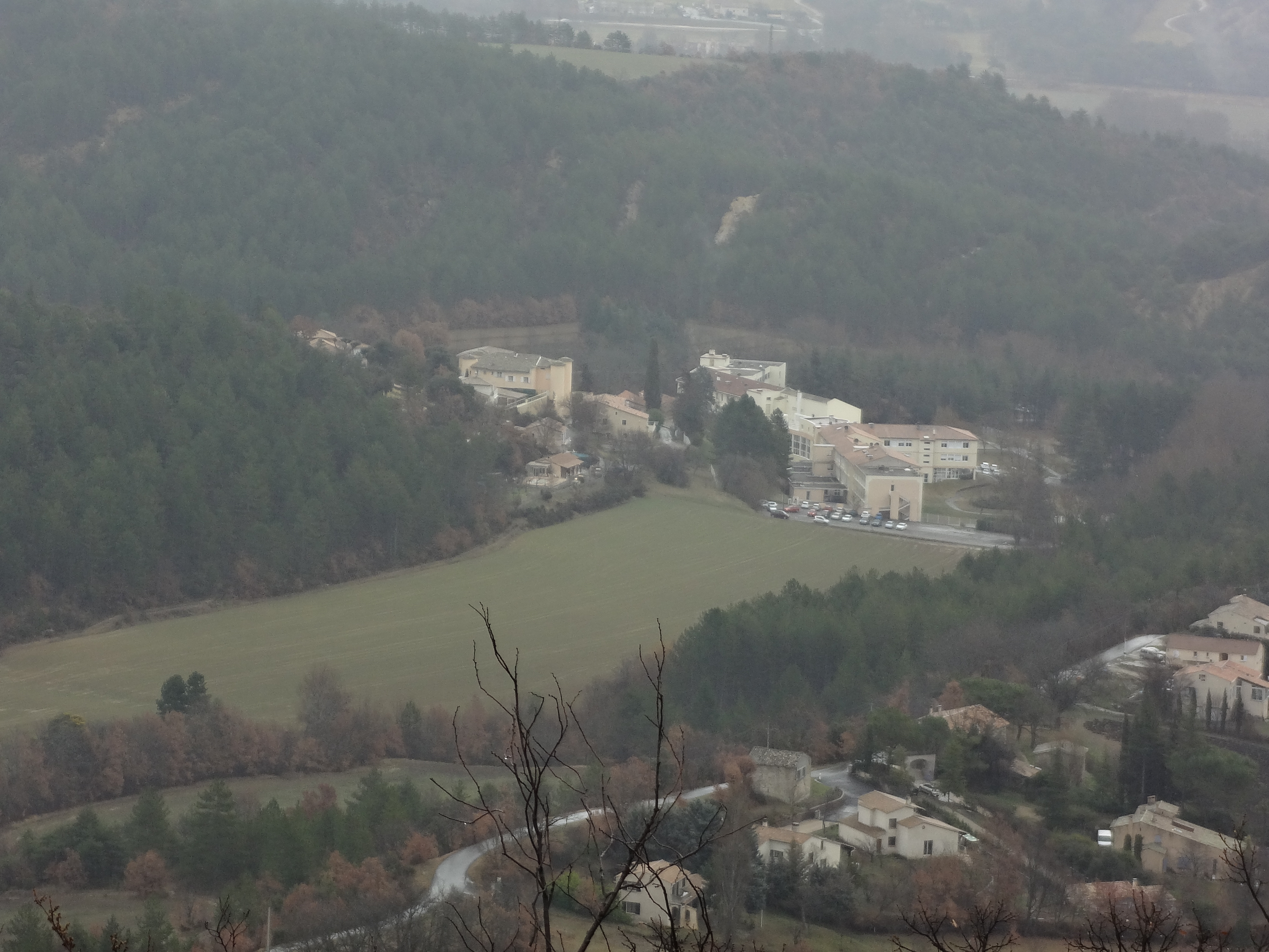 Hôpital des Carmes à Aiglun, avec le château des Villeneuve